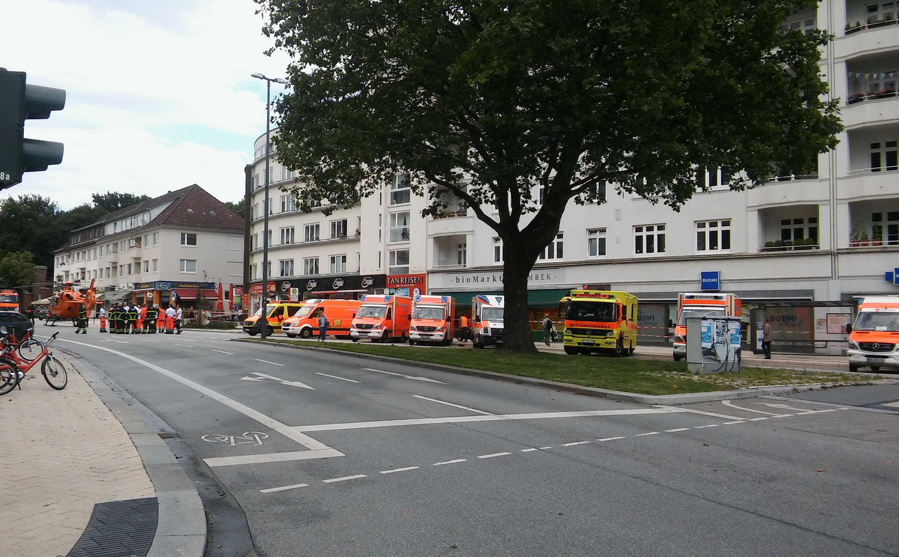 Messerattacke am 28. Juli 2017 im Hamburger Stadtteil Barmbek, zugeschnitten und Person ausgeblendet